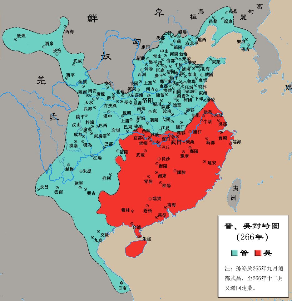 266年晉、吳兩國對峙形勢圖